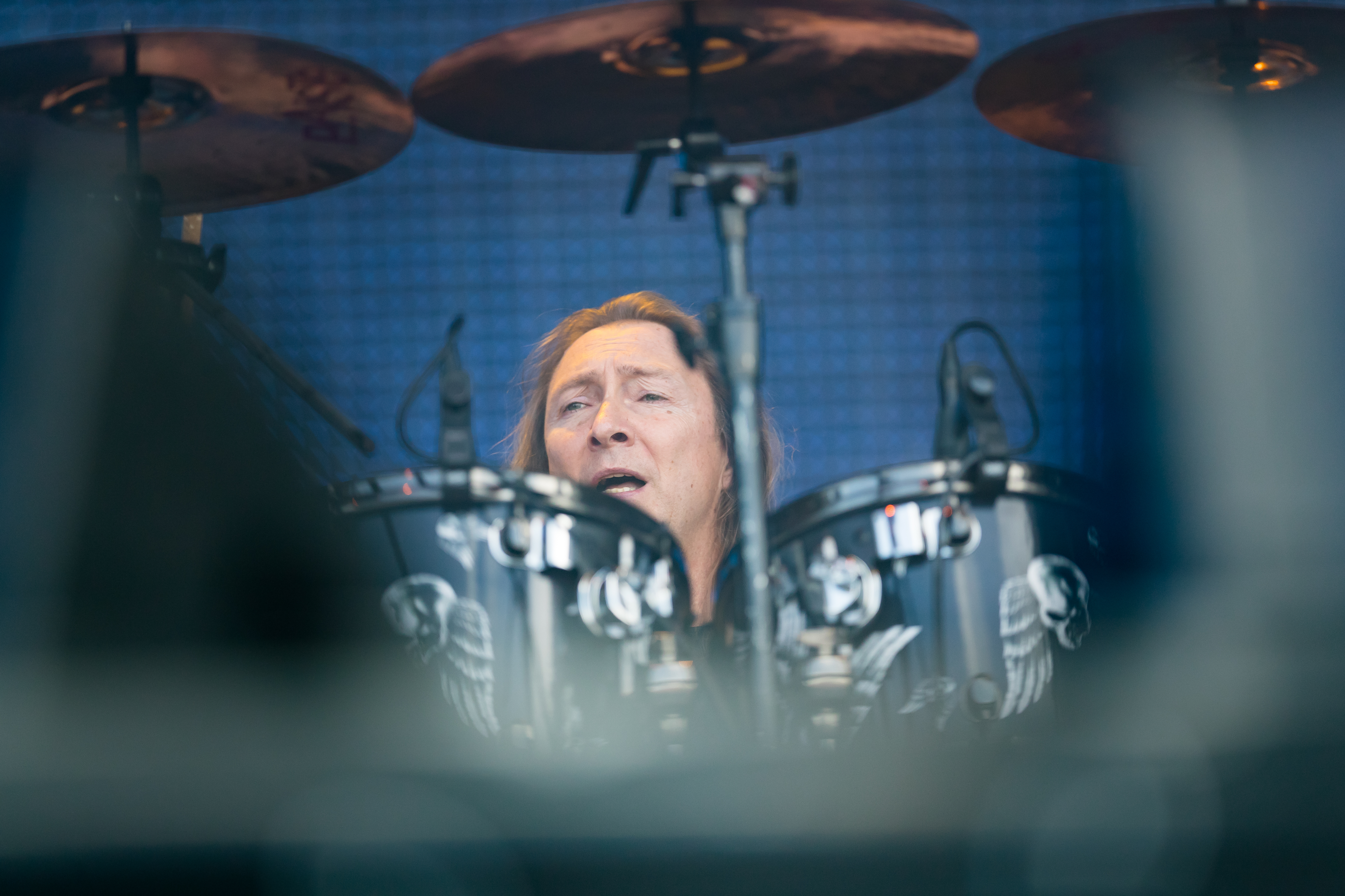 Grave Digger during Wacken Open Air at Schleswig-Holstein, Wacken, , Germany on 2017-08-04, Photo: Sven Mandel